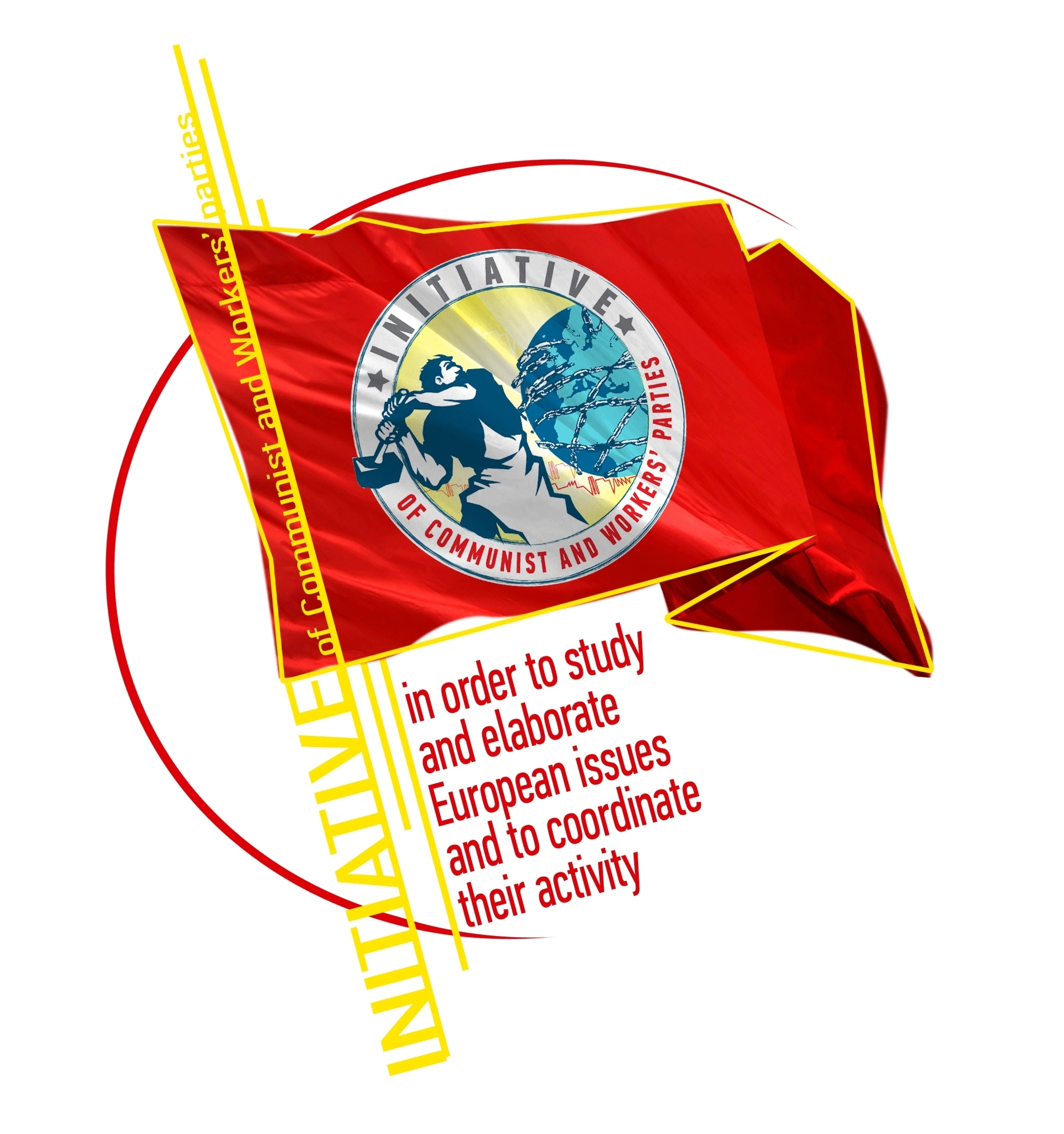 Инициатива на европейските комунистически и работнически партии - новият европейски комунистически Интернационал